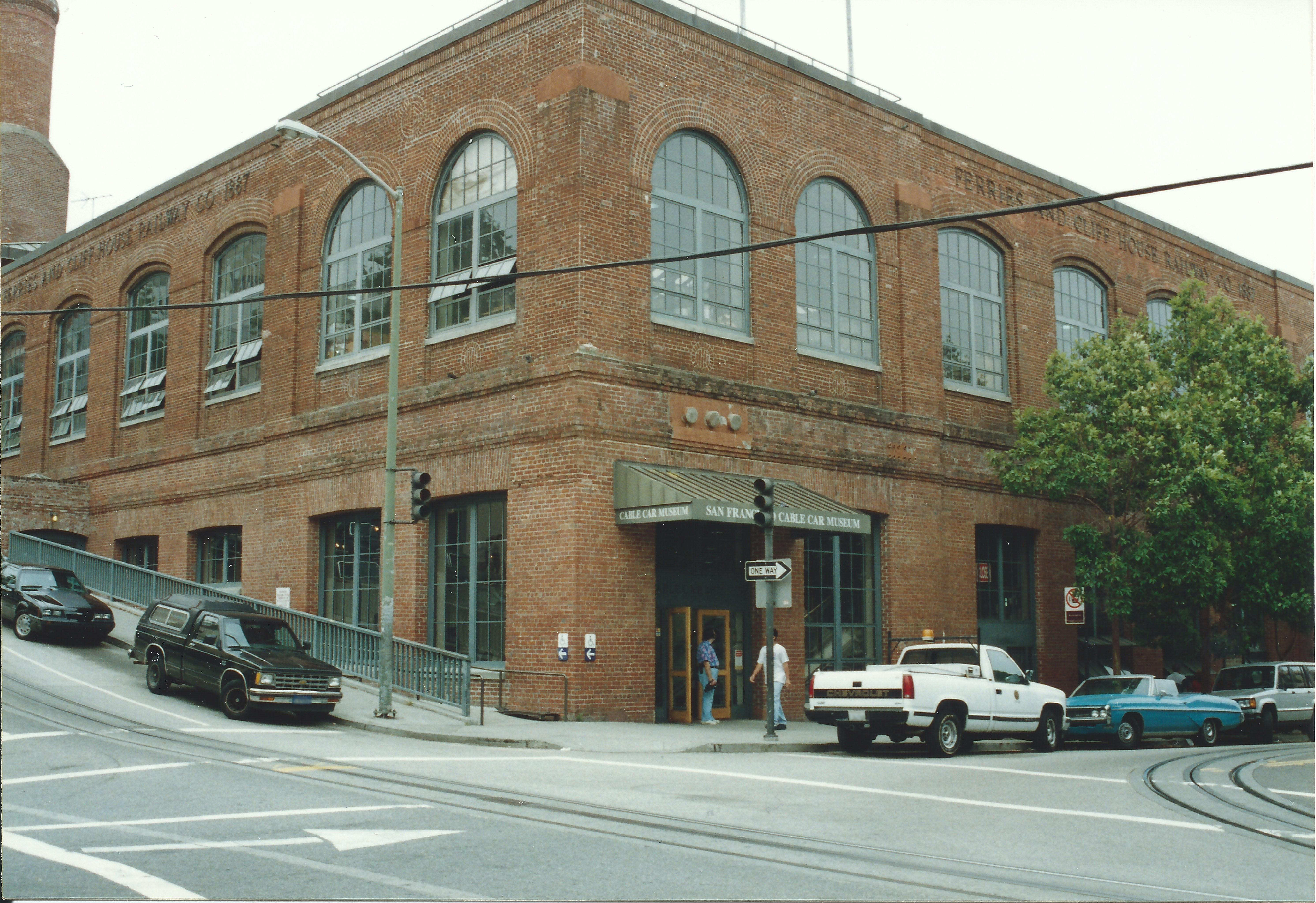 サンフランシスコ・ケーブルカー博物館